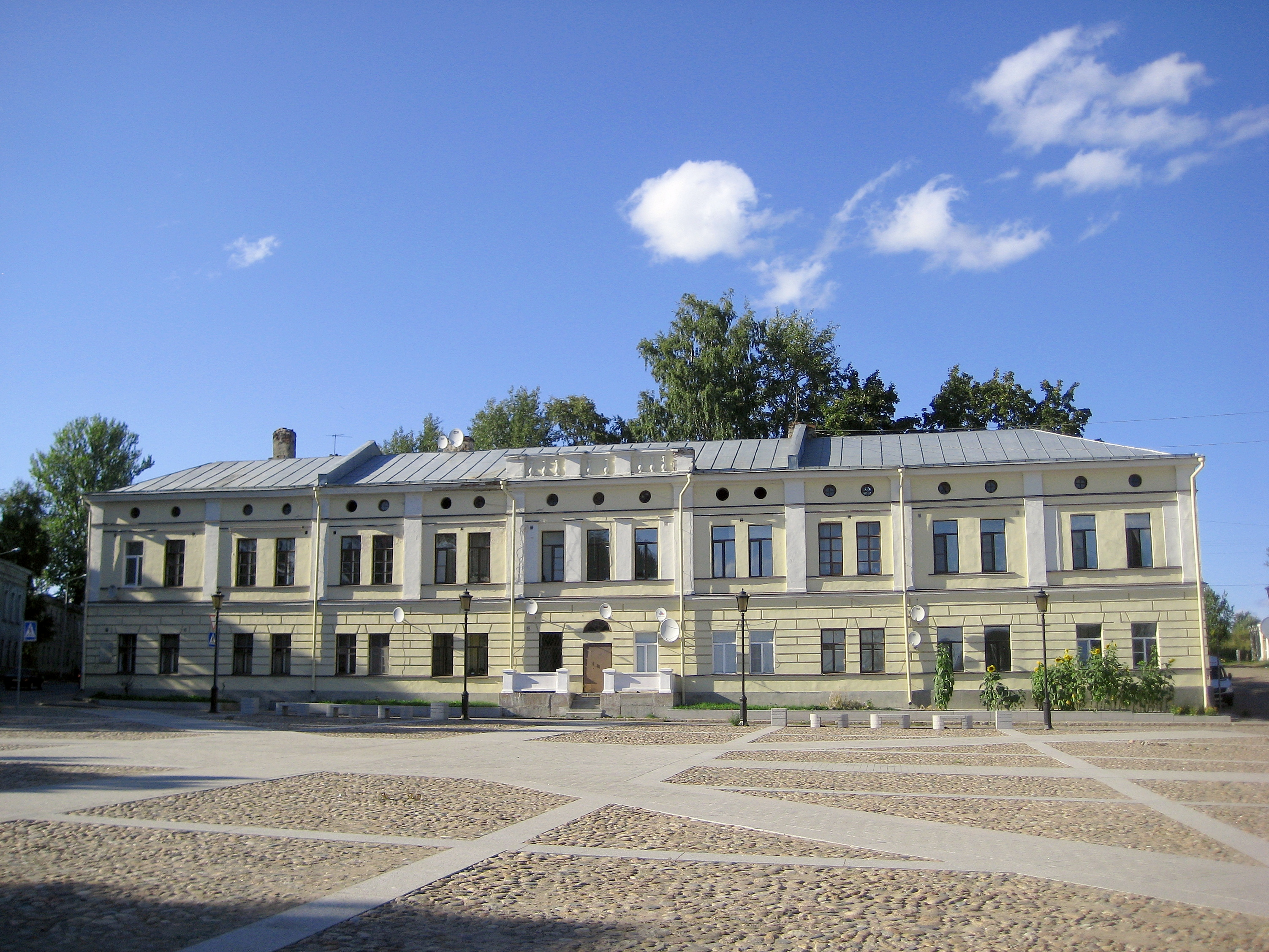 Дом Мендта (Лен.область, Выборг, улица Петровская)